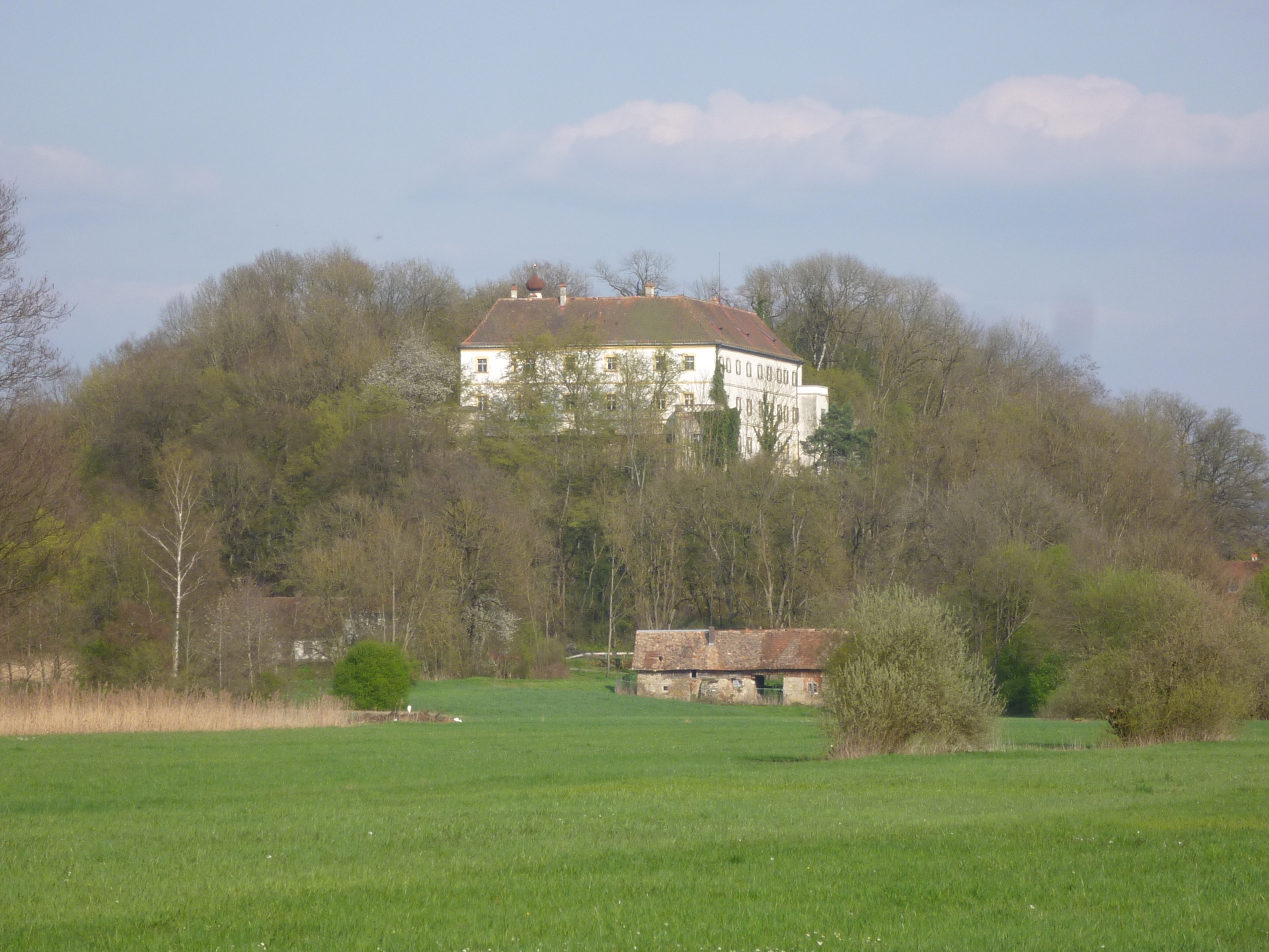 Blick auf das Schloss Offenberg in der Gemeinde Offenberg. Das Schloss befindet sich in Privatbesitz. Es wird für kulturelle Zwecke und Veranstaltungen genutzt.